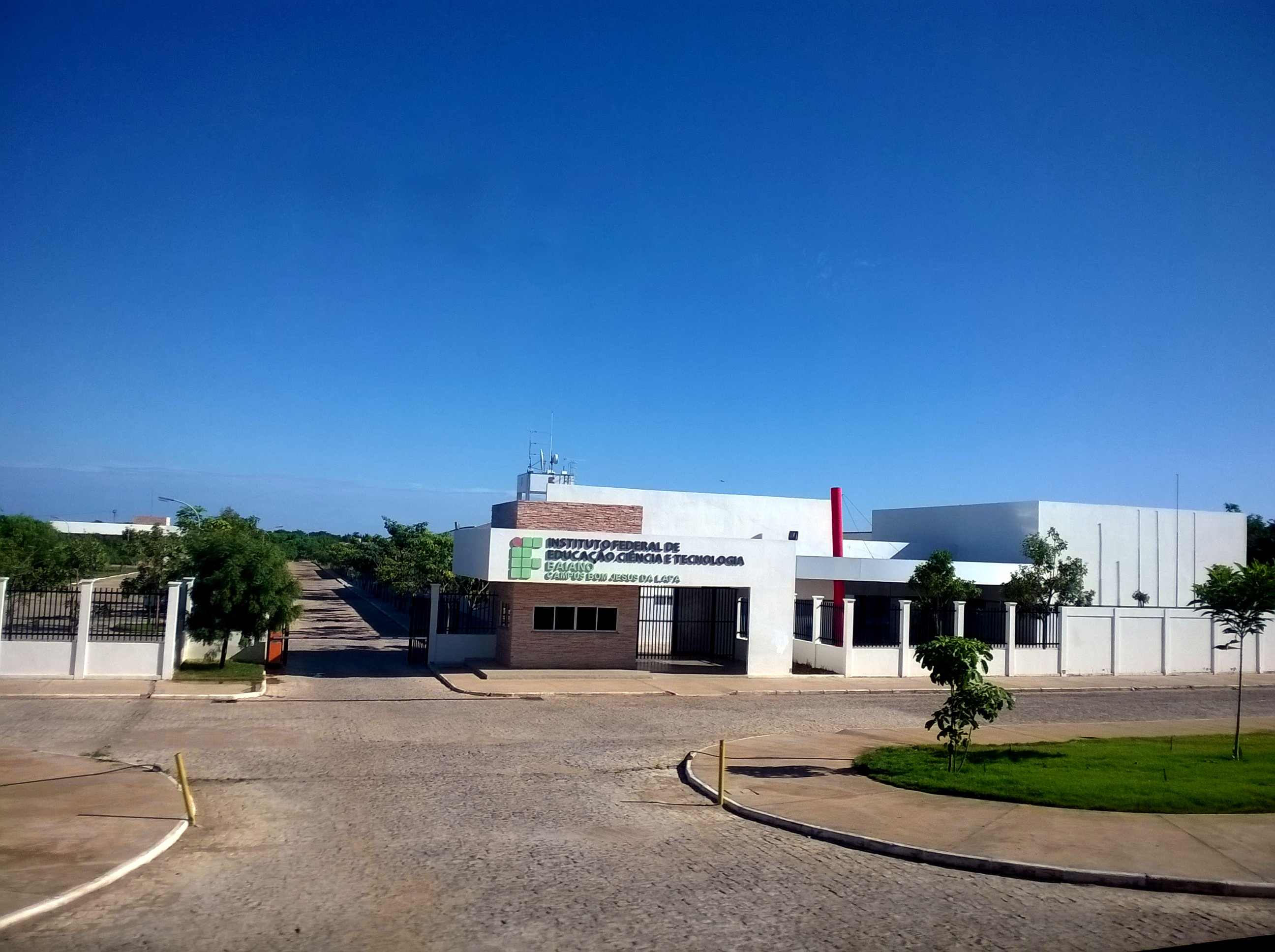 Instituto Federal Baiano, campus da cidade de Bom Jesus da Lapa. Foito de 11 de janeiro de 2017.